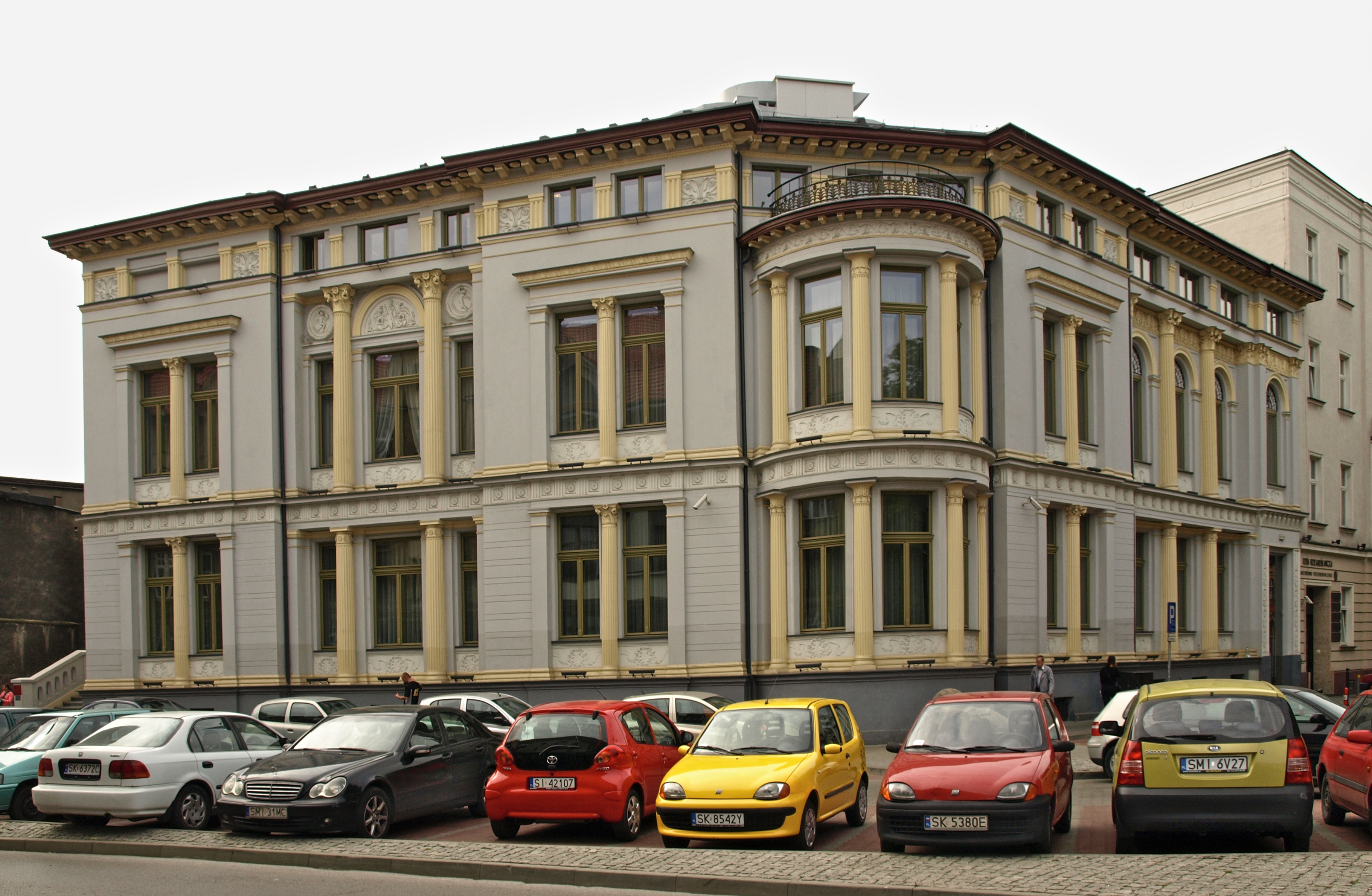 Katowice, pl. Wolności 12a - Pałac Goldsteinów (czasami nazywany Pałacem Przemysłowców lub Willą Goldsteinów) − neorenesansowy pałac braci Abrahama i Józefa Goldsteinów, położony w zachodniej części śródmieścia Katowic, na rogu placu Wolności i ul. Jana Matejki (zabytek nr A/1315/83)